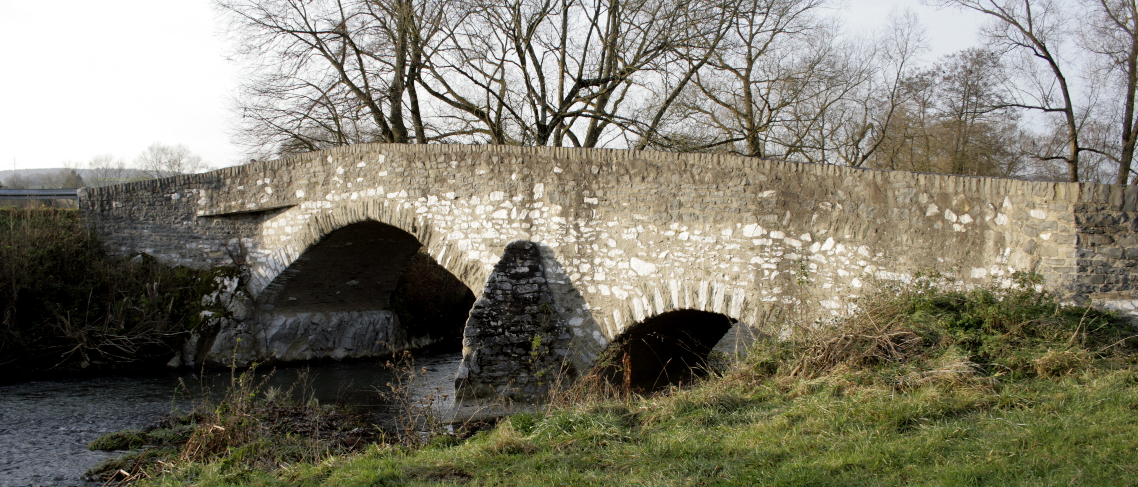 Wendelinbrücke bei Niederhadamar, Deutschland, stromab gesehen